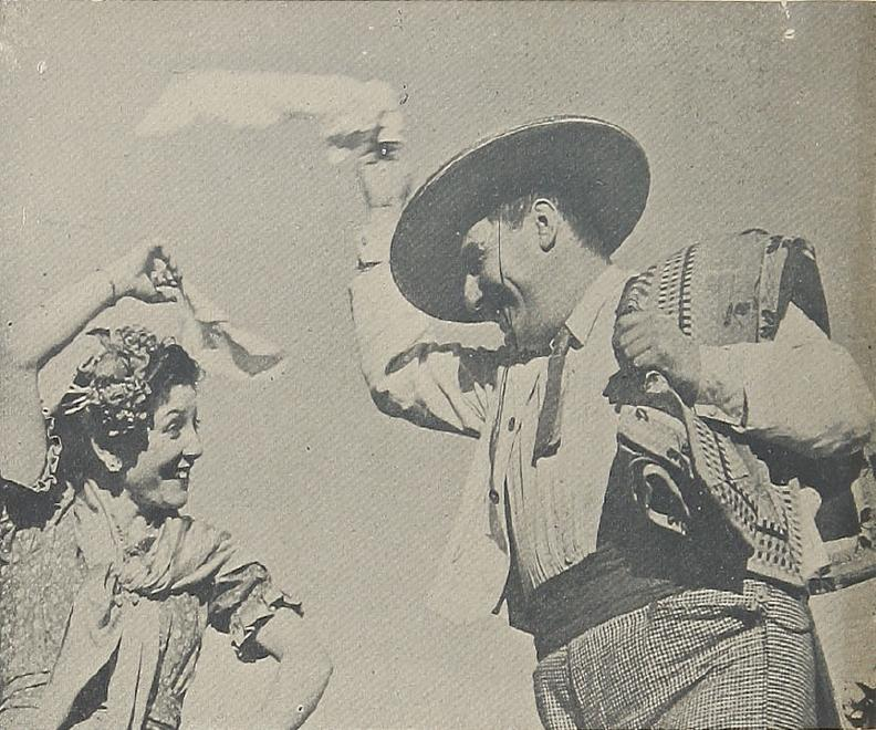 "La cueca es un baile popular chileno. He aquí una pareja de guasos demostrando su agilidad en la danza nacional"